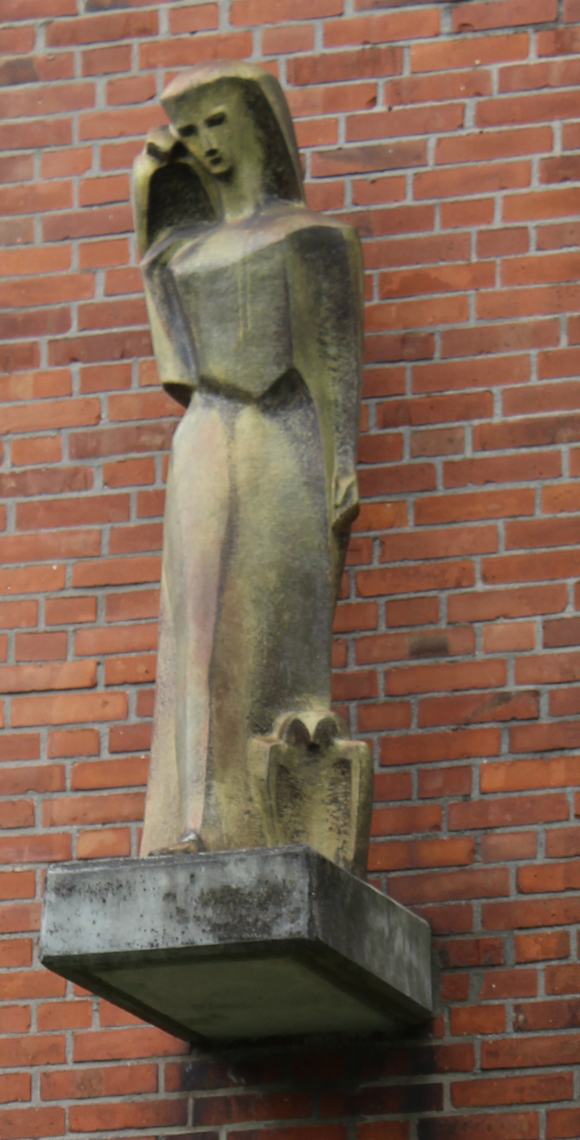 Skulptur von Vilma Lehrmann-Amschler (1910-1989)